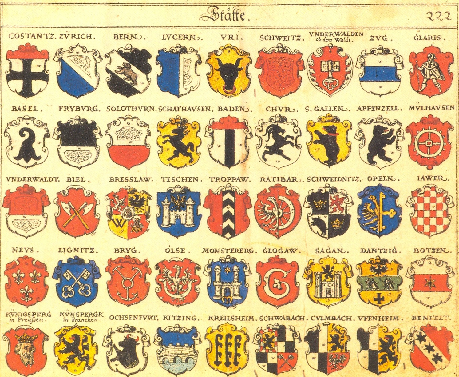 Johann Siebmacher: New Wappenbuch eingescannt aus: Horst Appuhn (Hrsg.), Johann Siebmachers Wappenbuch. Die bibliophilen Taschenbücher 538, 2. verb. Aufl , Dortmund 1989 Stätte/Städte Blatt 222